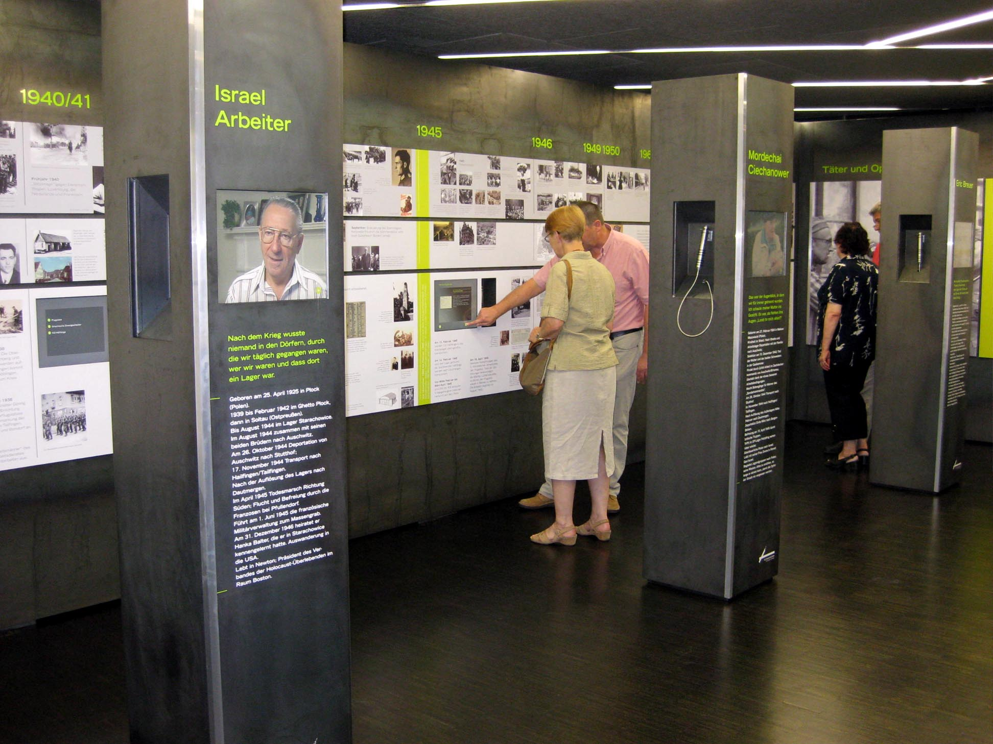 Ausstellungs- und Dokumentationsstelle im Tailfinger Rathaus - Deutschland, Baden-Württemberg, Landkreis Böblingen, Gäufelden-Tailfingen